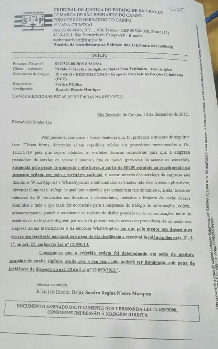 A 1ª Vara Criminal de São Bernardo do Campo determinou a operadoras de telefonia o bloqueio do aplicativo WhatsApp, pelo período de 48 horas. O prazo passa a contar a partir da 0 hora seguinte ao recebimento do ofício da Justiça. A decisão foi proferida em um procedimento criminal, que corre em segredo de justiça. Isso porque o WhatsApp não atendeu a uma determinação judicial de 23 de julho de 2015. Em 7 de agosto de 2015, a empresa foi novamente notificada, sendo fixada multa em caso de não cumprimento. Como, ainda assim, a empresa não atendeu à determinação judicial, o Ministério Público requereu o bloqueio dos serviços pelo prazo de 48 horas, com base na lei do Marco Civil da internet, o que foi deferido pela juíza Sandra Regina Nostre Marques.